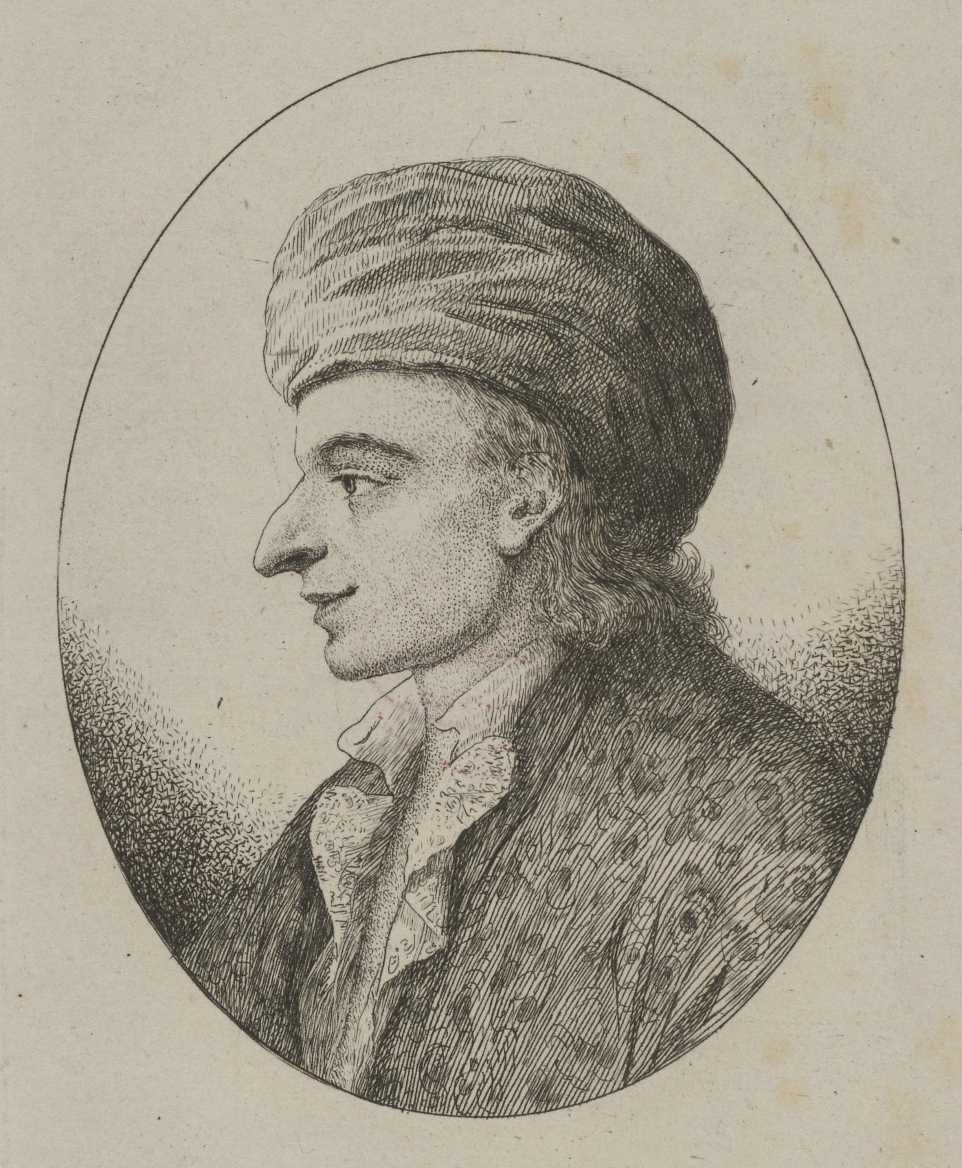 Dresdner Kriegsrat und Legationssekretär Christian Ludwig Liscow (1701-1760).